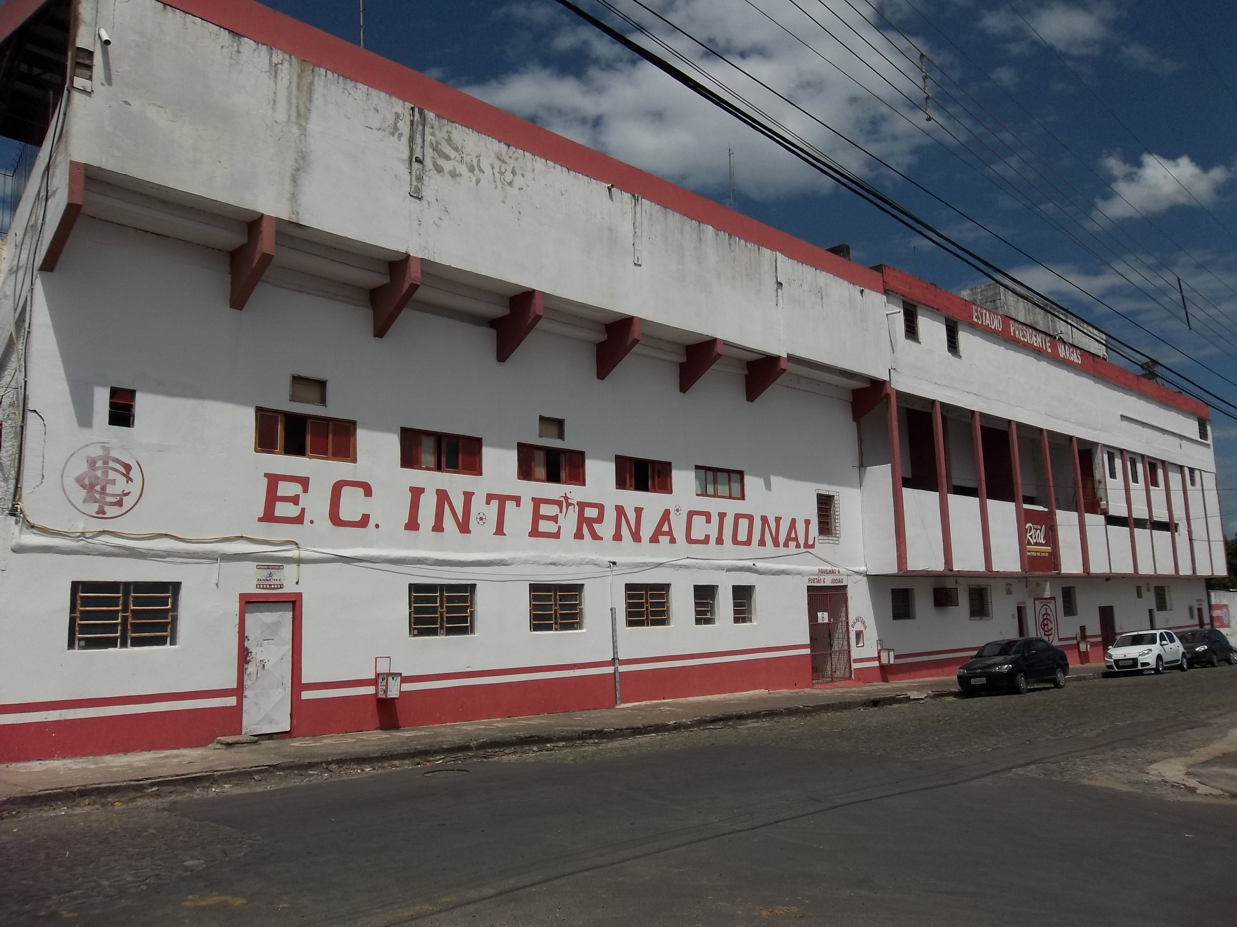 Estádio Presidente Vargas. Esporte Clube Internacional, Noal, Sede, Santa Maria, Rio Grande do Sul, Brasil